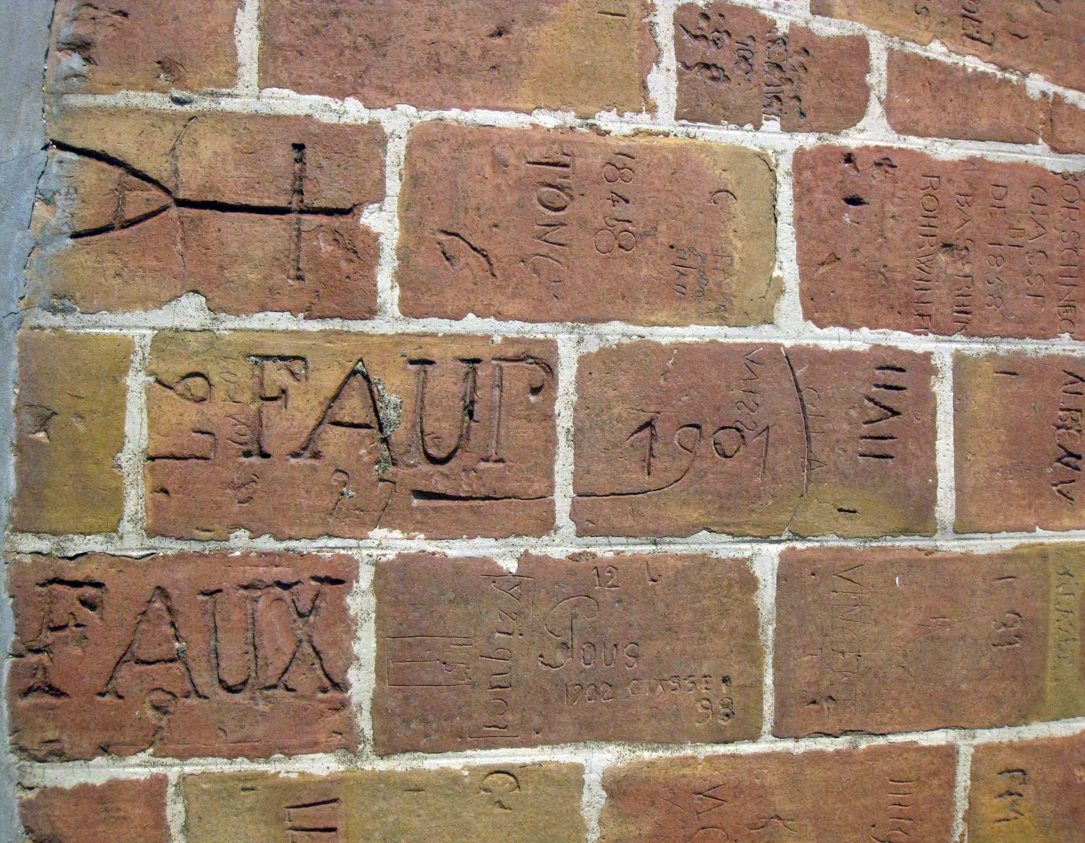 Fort de Sant Elm (Cotlliure)